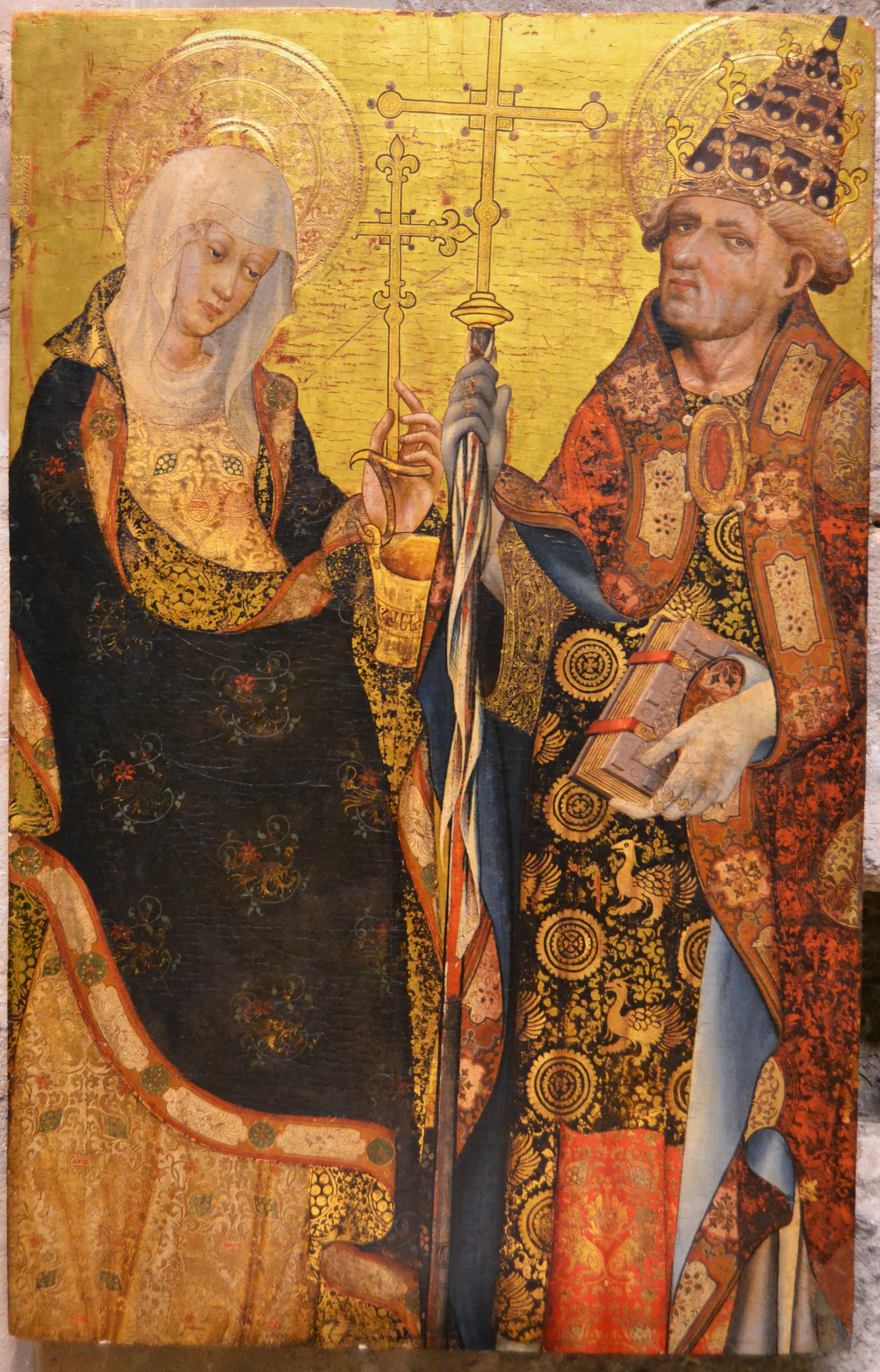 La obra representa a Santa Marta junto al papa San Clemente.